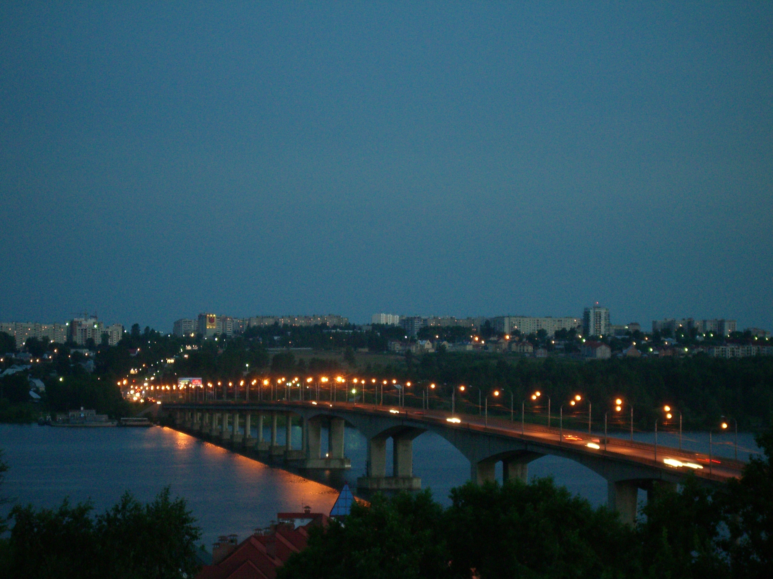 Кострома. Автомобильный мост через Волгу вечером